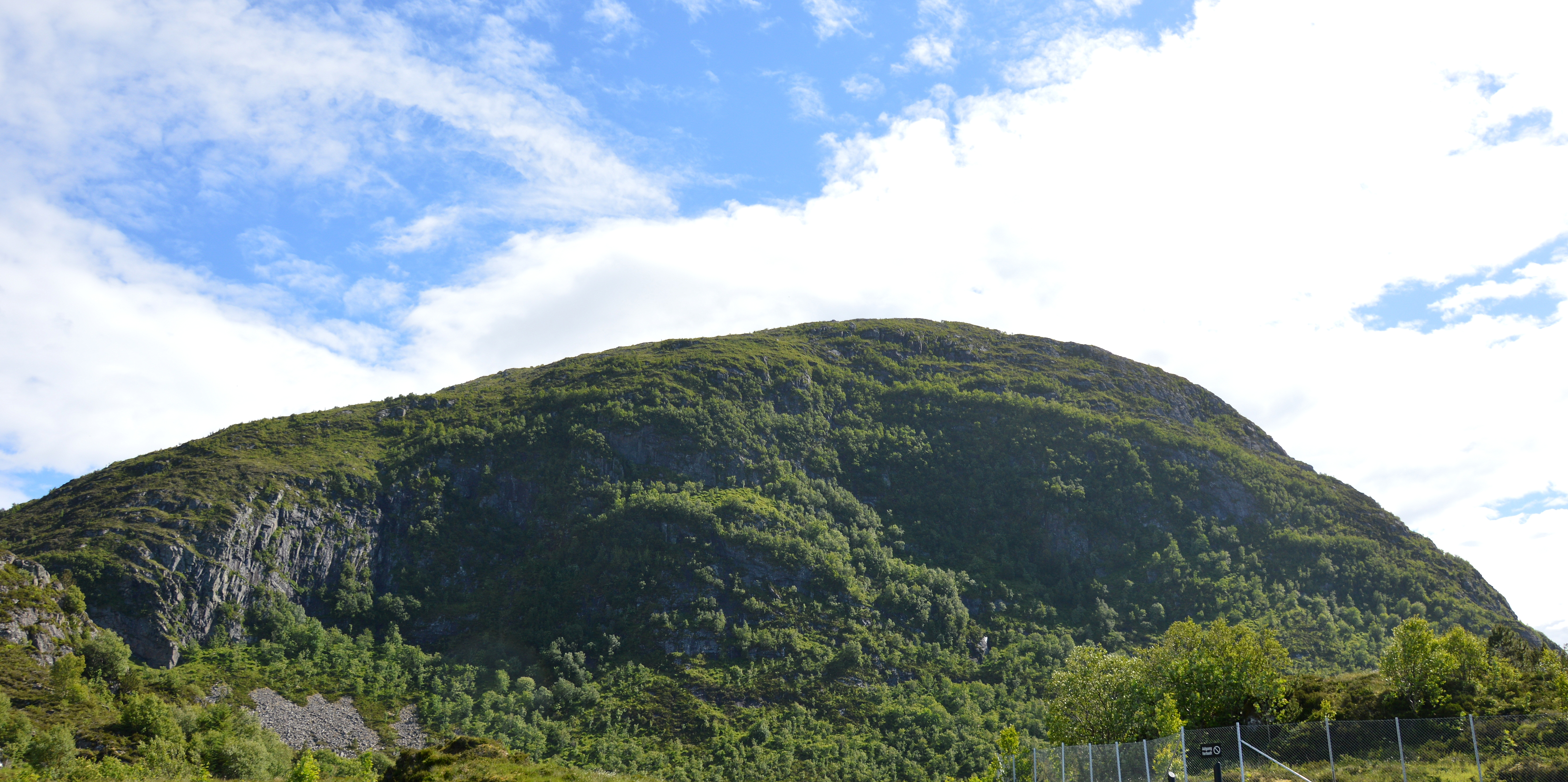 Sukkertoppen